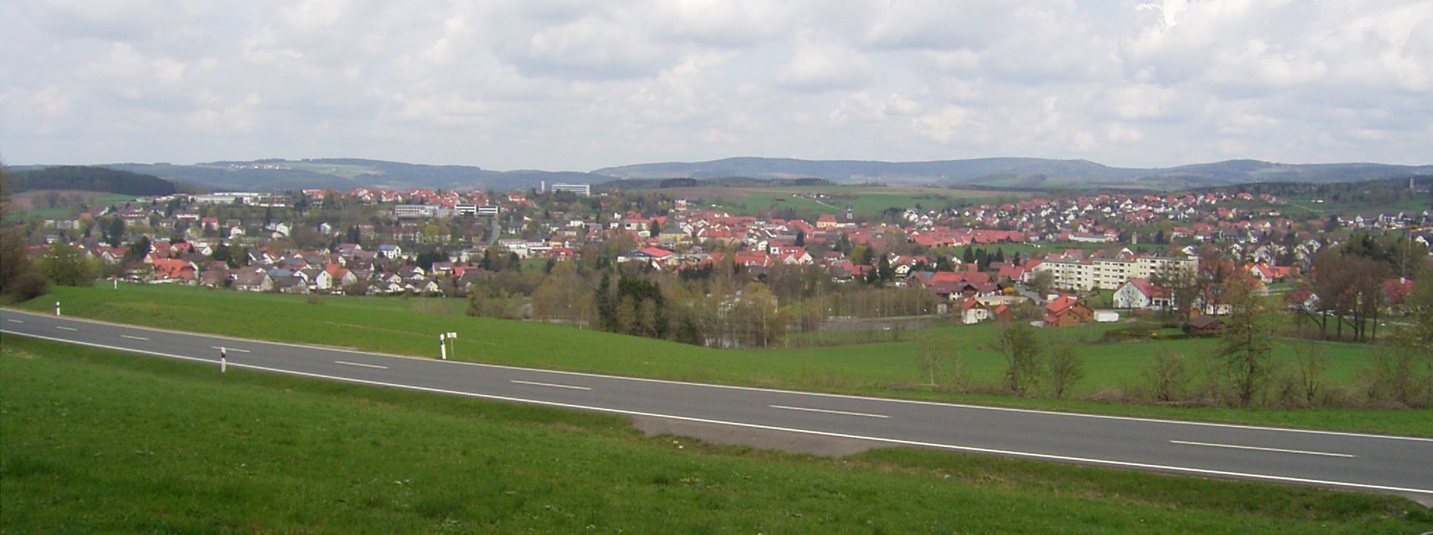 Gesamtansicht Oberviechtachs in der Oberpfalz aus Suedosten